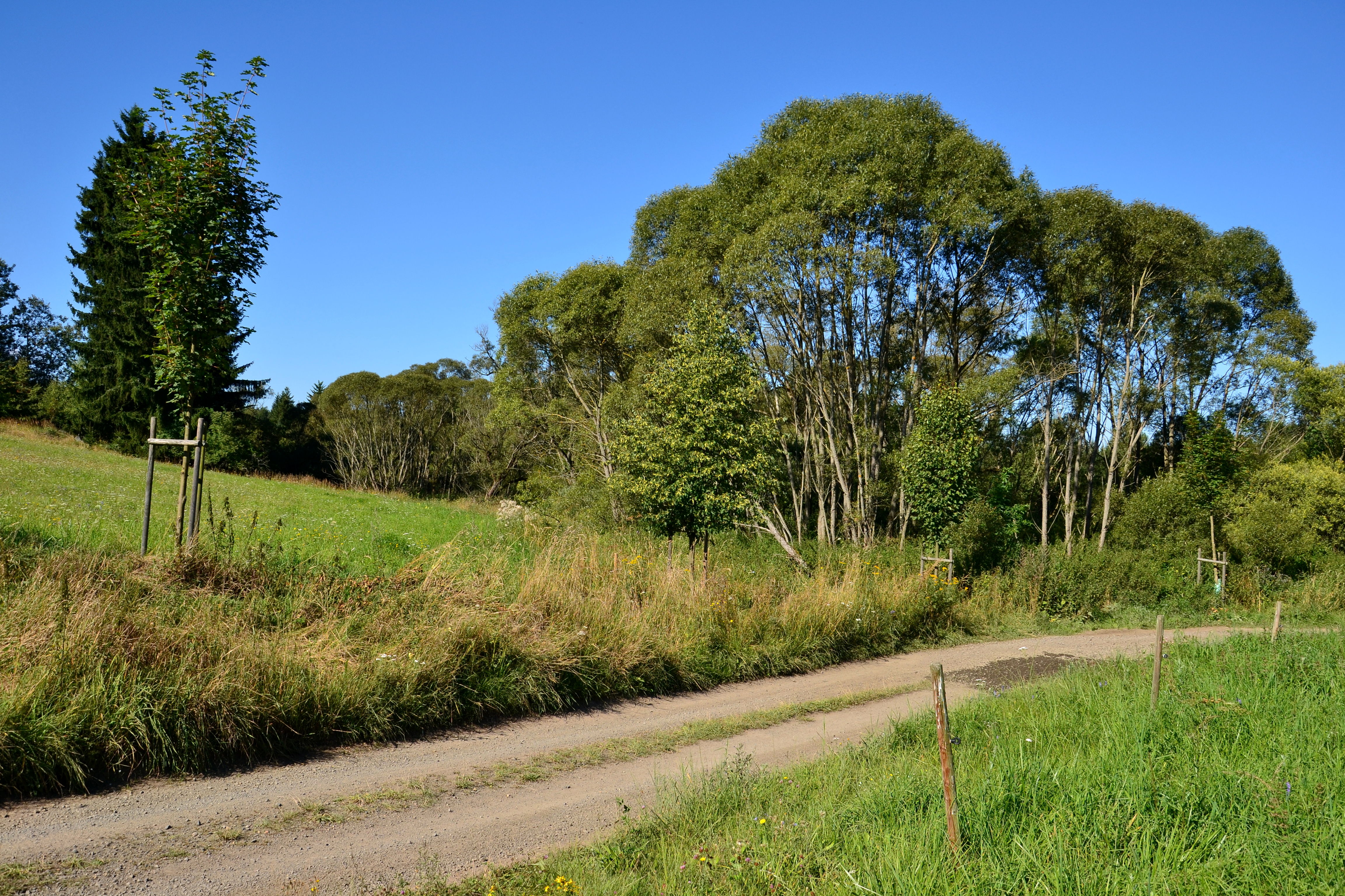 Cesta přes chráněné území